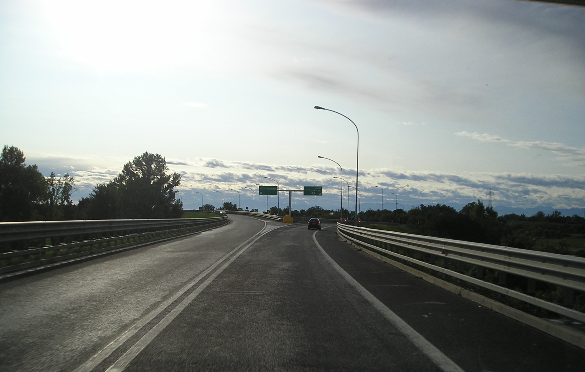 Km 0 della A 23 a Palmanova